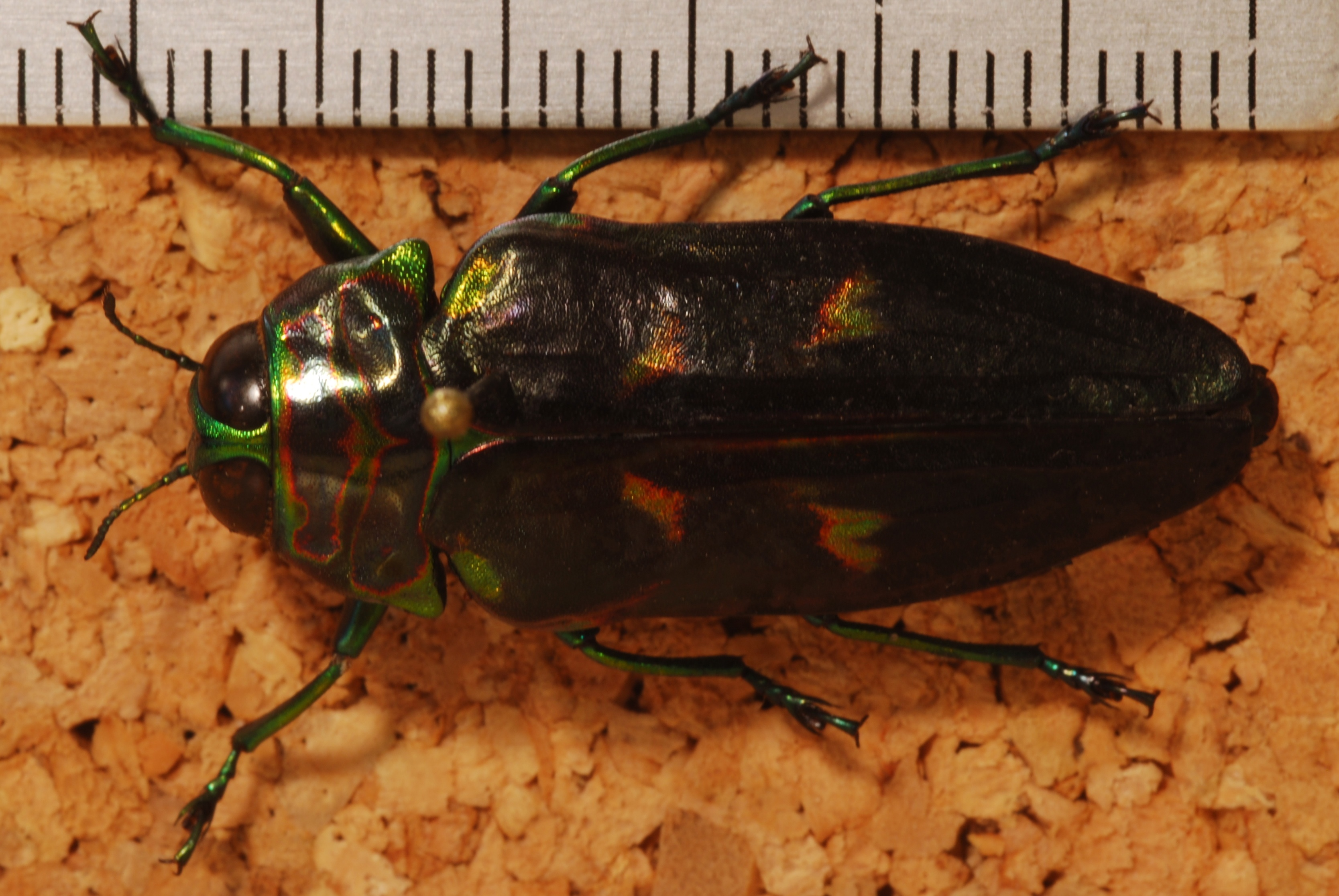 Obidos, Para, BRAZIL